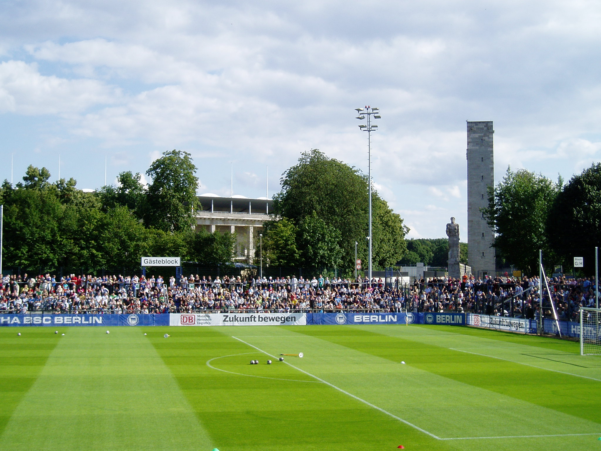 Olympiapark Berlin, Amateurstadion: Saisoneröffnung von Hertha BSC mit Blick zu Olympiastadion (links) und Friesenturm